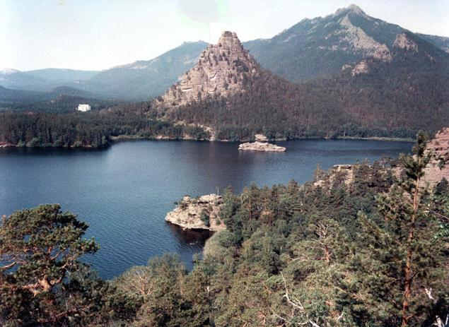 Parque Nacional de Burabai autor: User:Kalendar